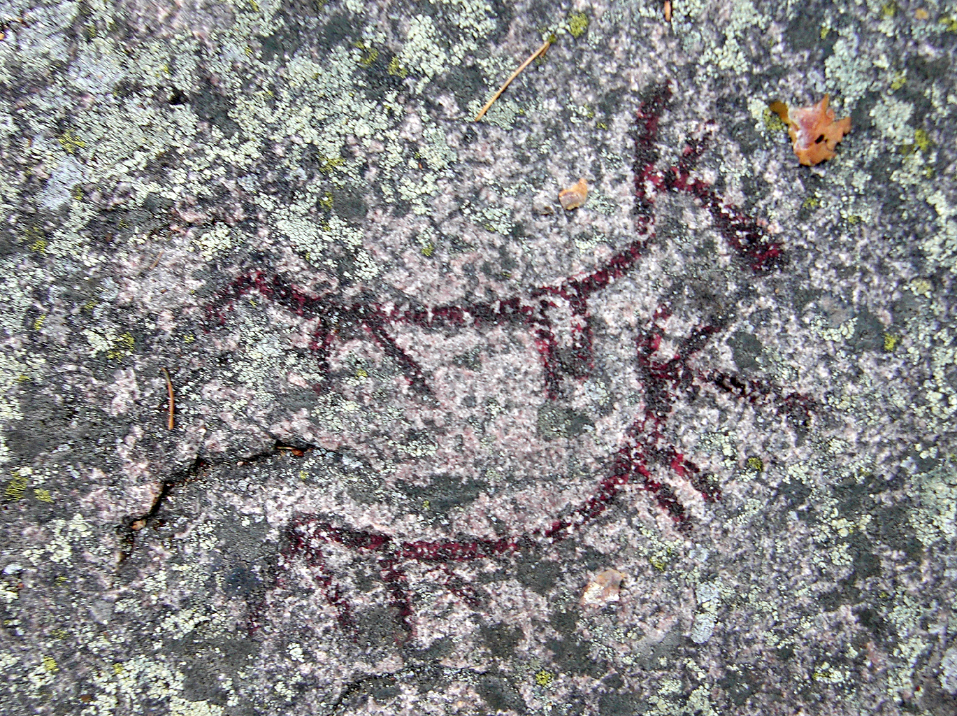 Djurmotiv på hällristningen Hästhallen (RAÄ-nr Torhamn 11:1) i Torhamns socken, Karlskrona kommun, Blekinge, Sverige.